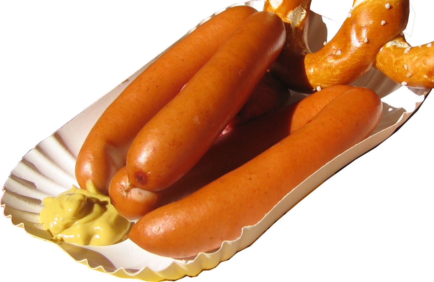 Frankfurter Würstel